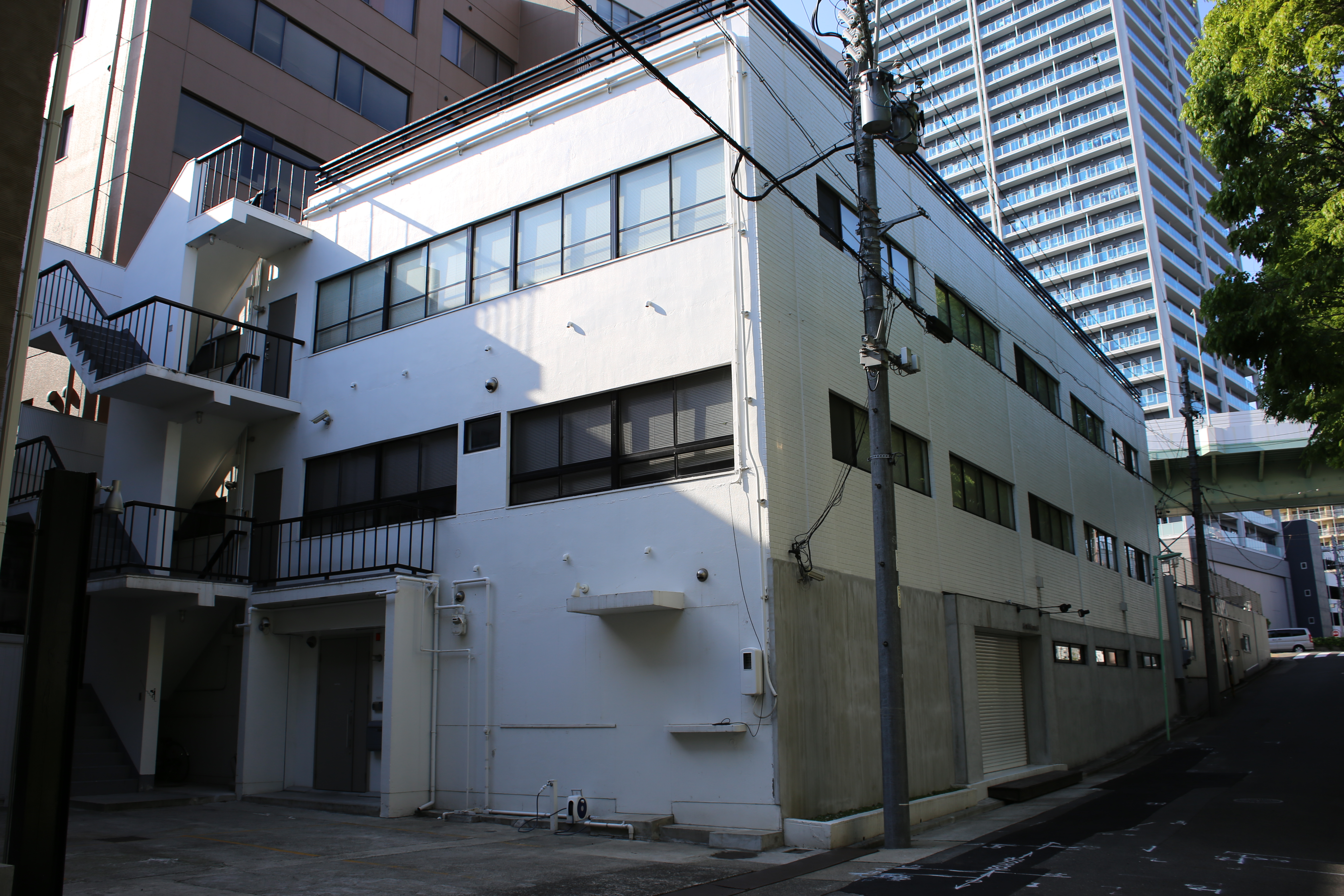 名古屋市中区平和一丁目のソニックパワード本社を東側公道南側より撮影。